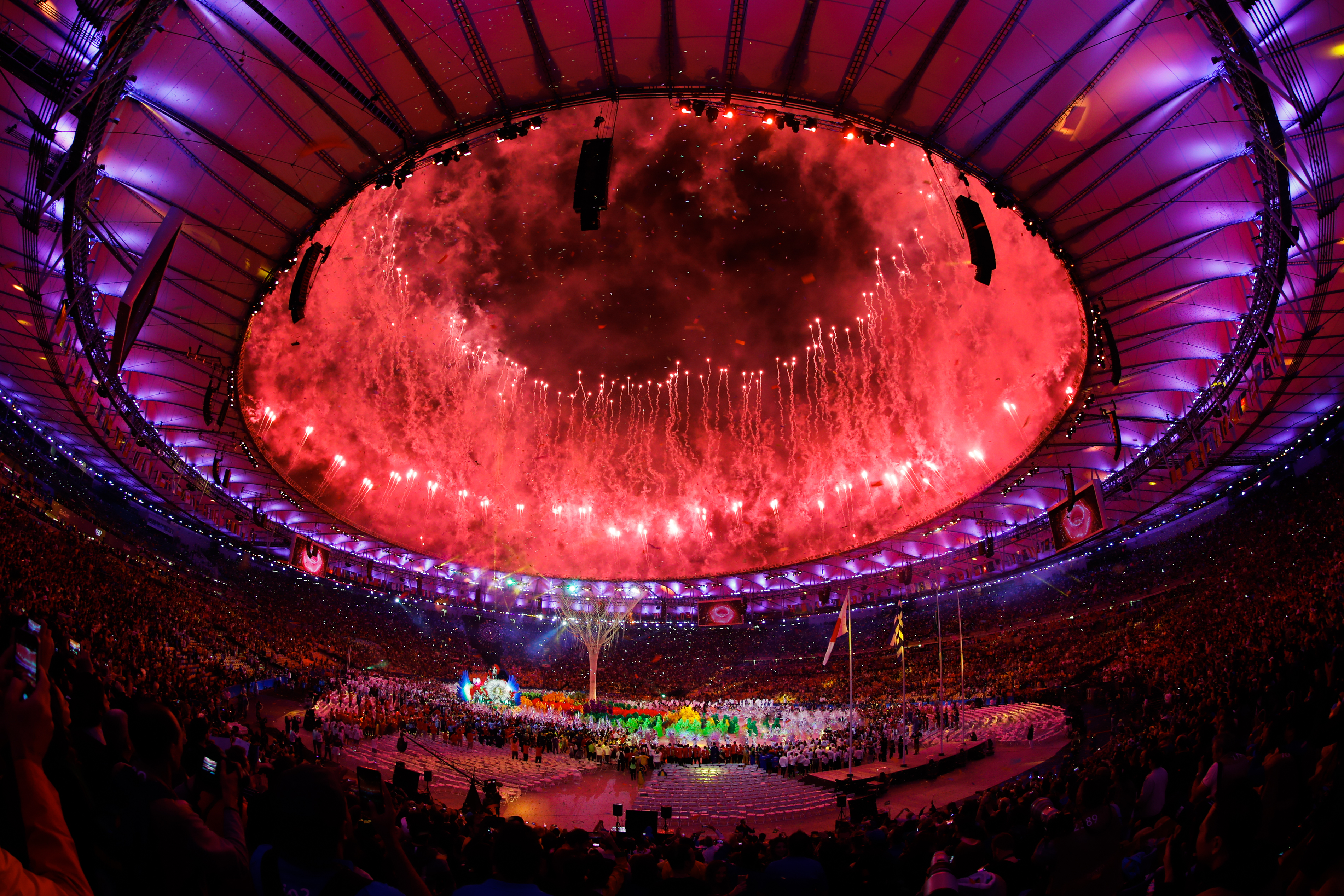 Rio de Janeiro - Cerimônia de encerramento dos Jogos Olímpicos Rio 2016, no Maracanã ( Fernando Frazão/Agência Brasil)